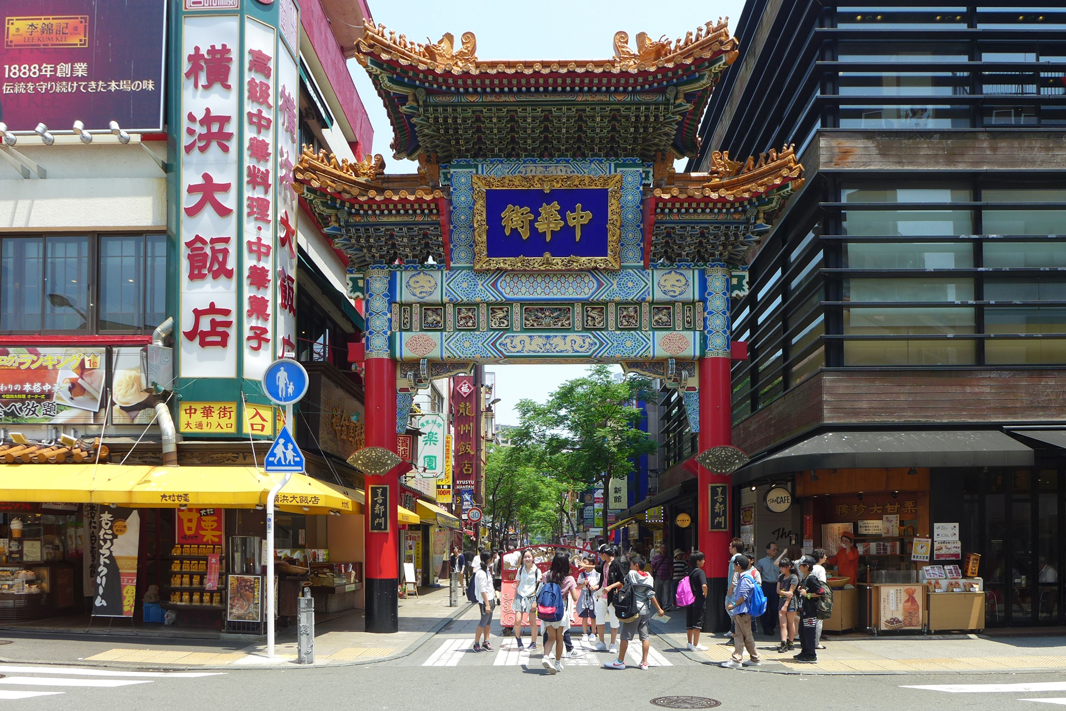 橫濱中華街善意門